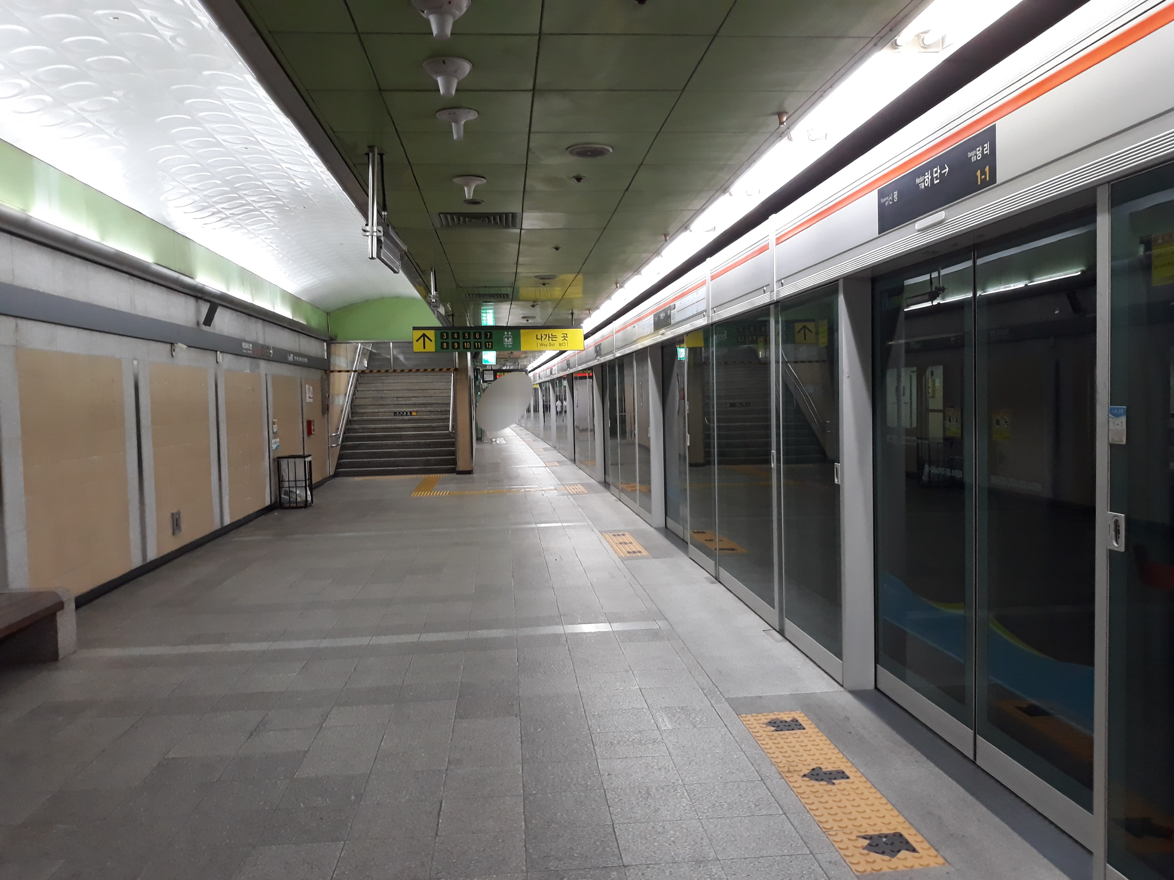 부산 도시철도 1호선 하단역 노포 방면 승강장